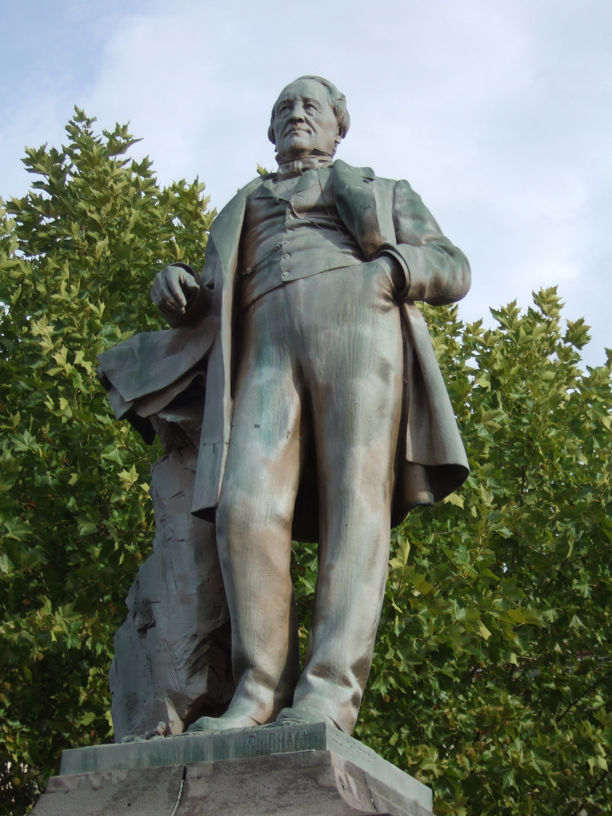 Statue de François-Gracchus Cabrol sur la place Cabrol à Decazeville (Aveyron)